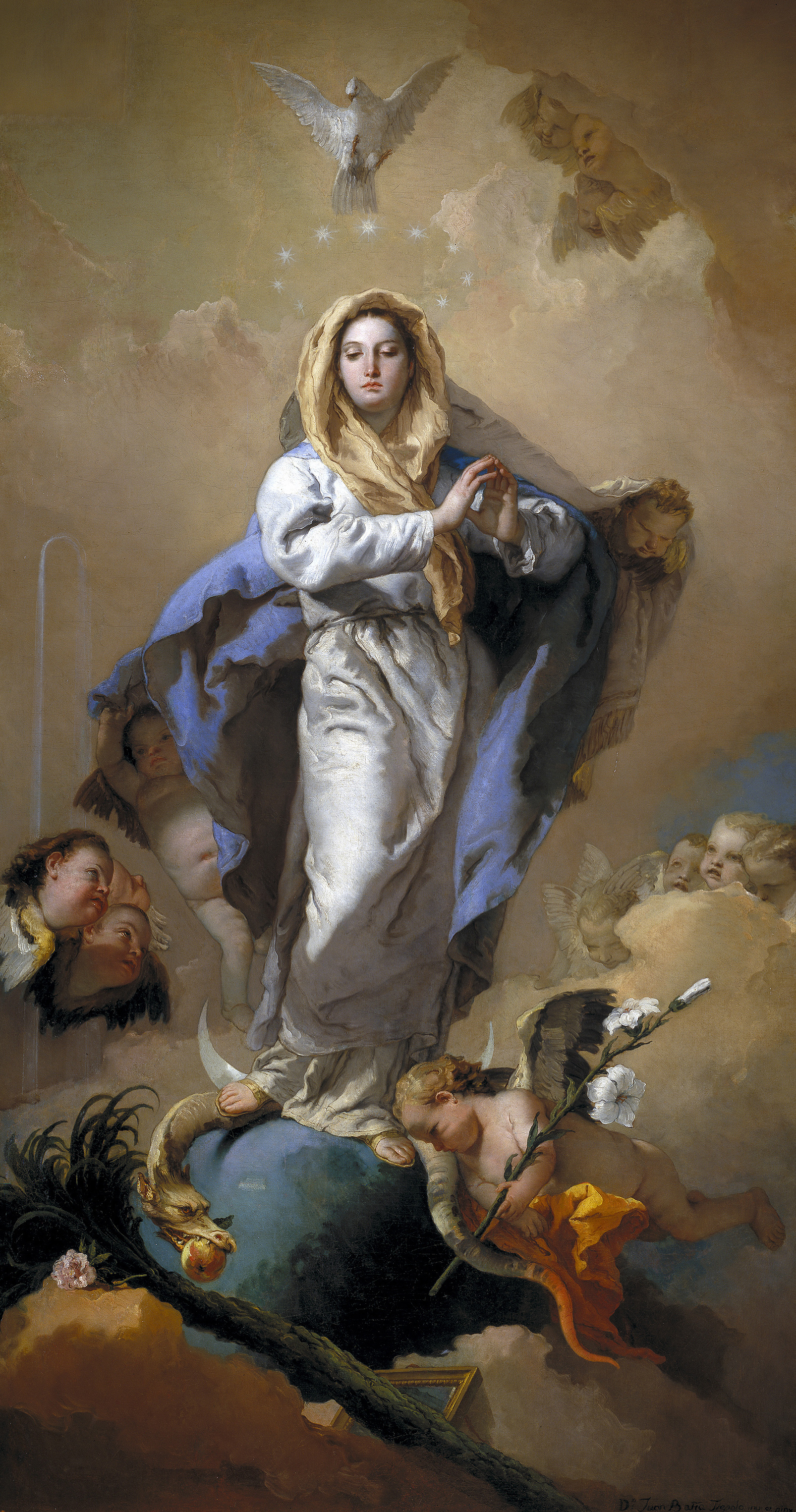 Inmaculada Concepción, 281 × 155 cm. Madrid, Museo del Prado.